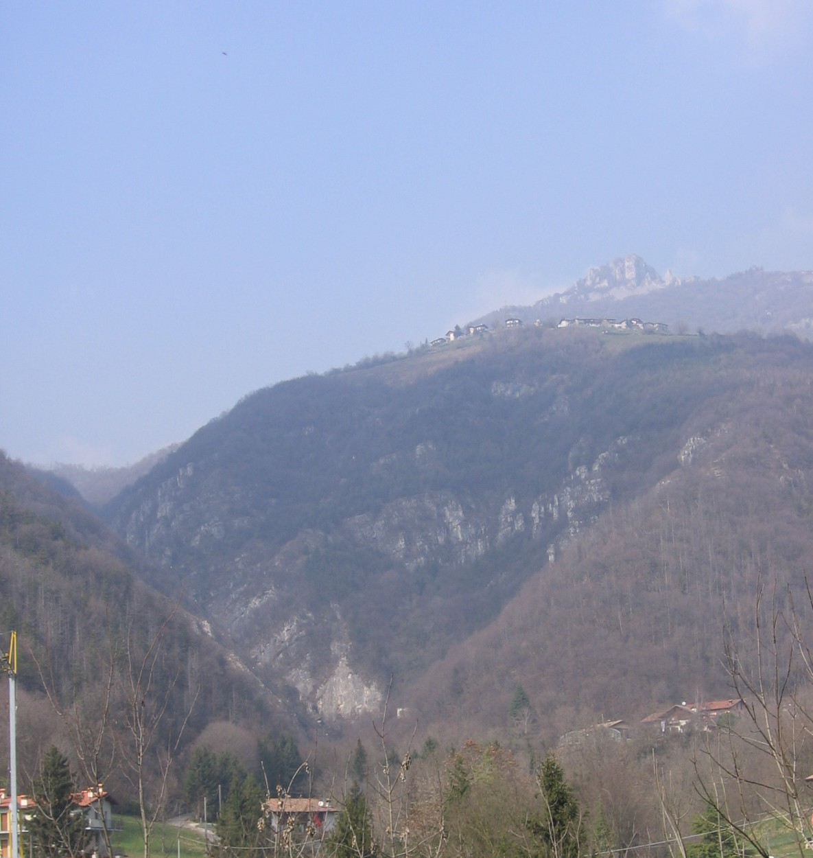 Albino, Bergamo, Italy.